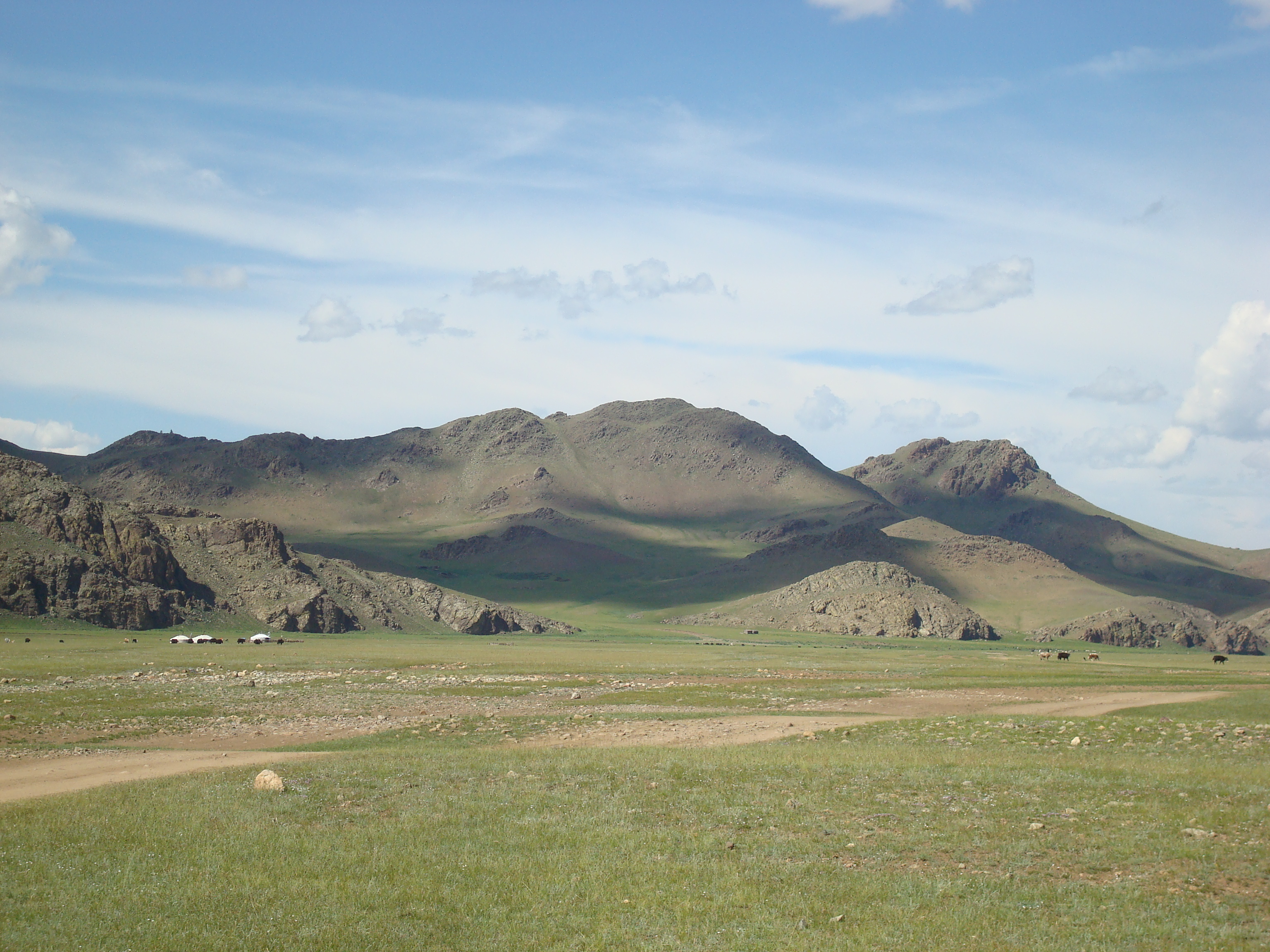 Grassteppe im Chöwsgöl-Aimag